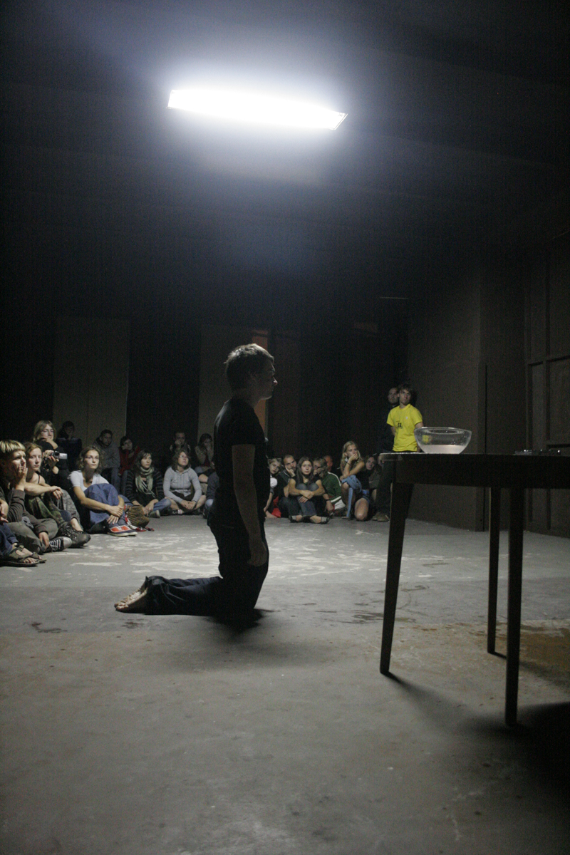 Performance "Portrety ojców" Mateusza Felsmanna.